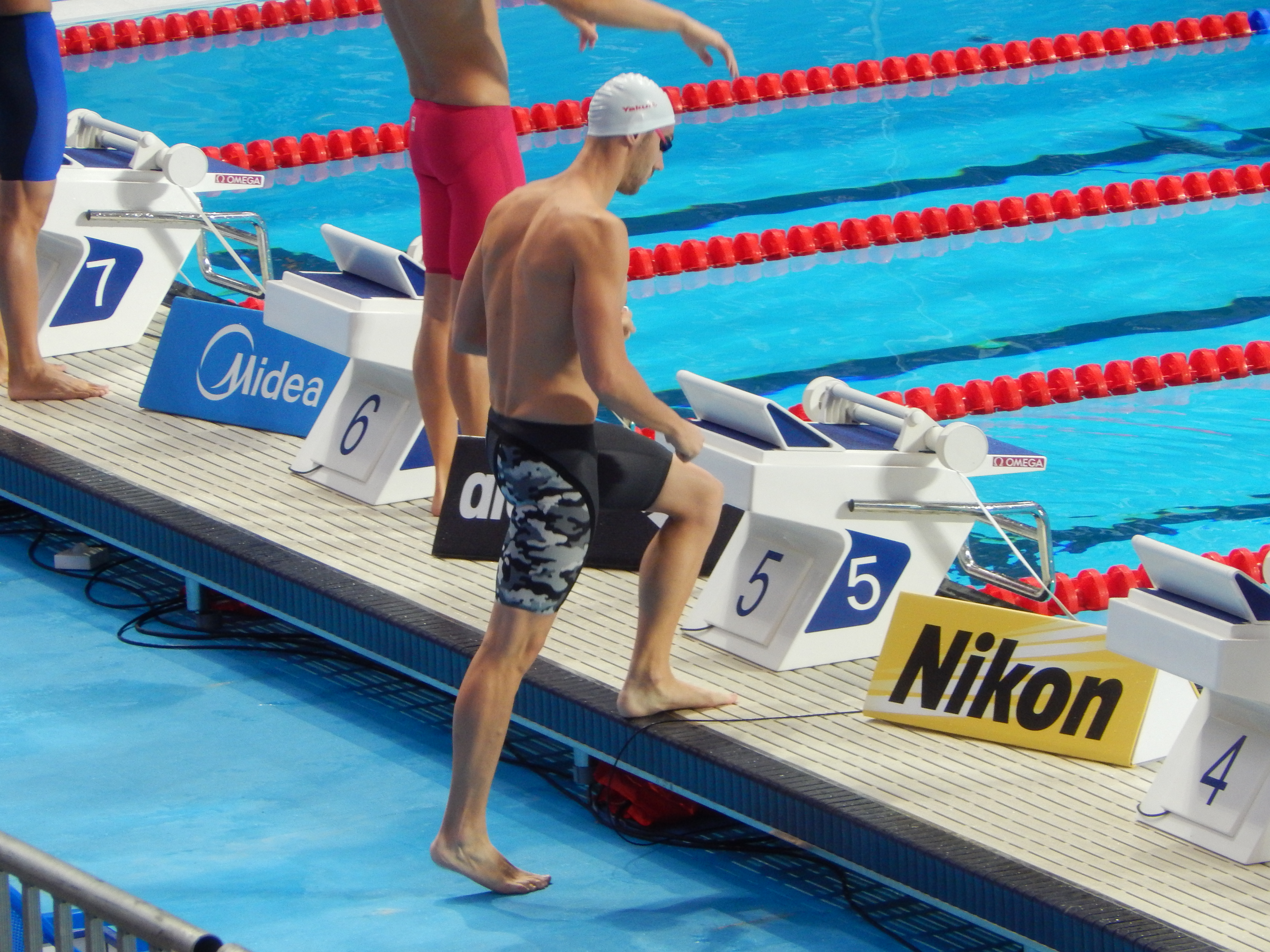 Жереми Стравью на чемпионате мира в Казани